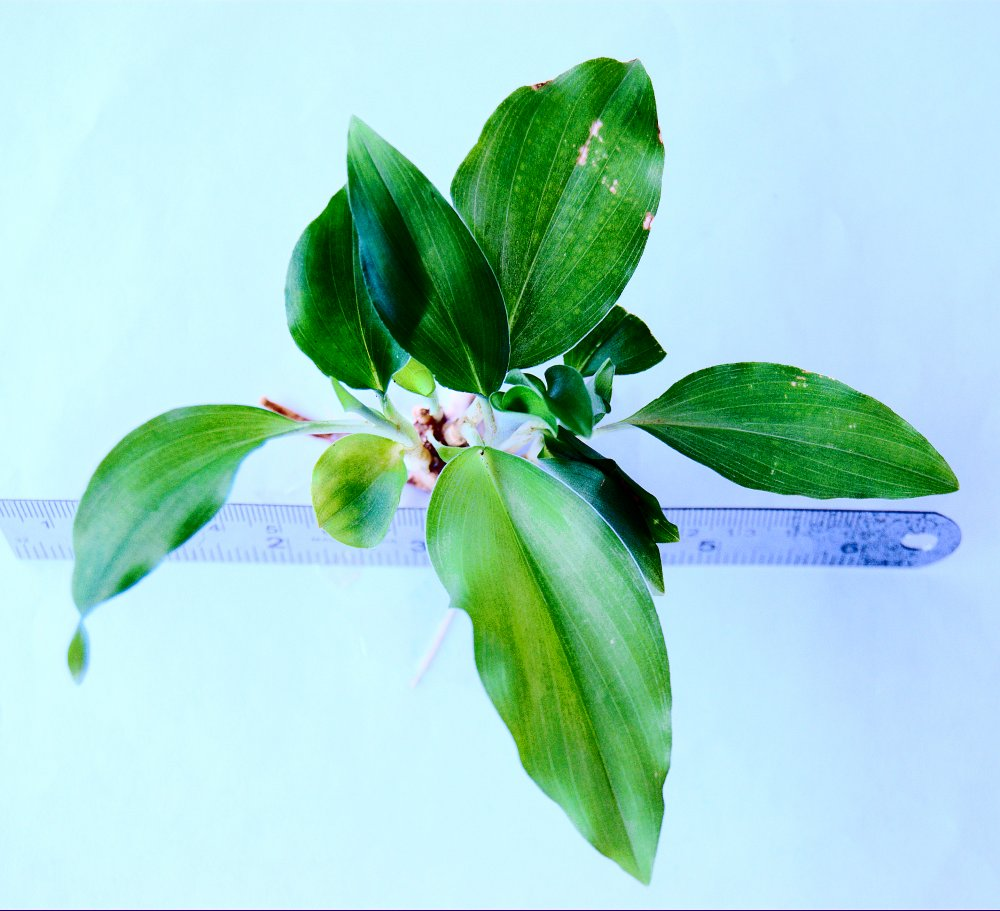 കച്ചോലം